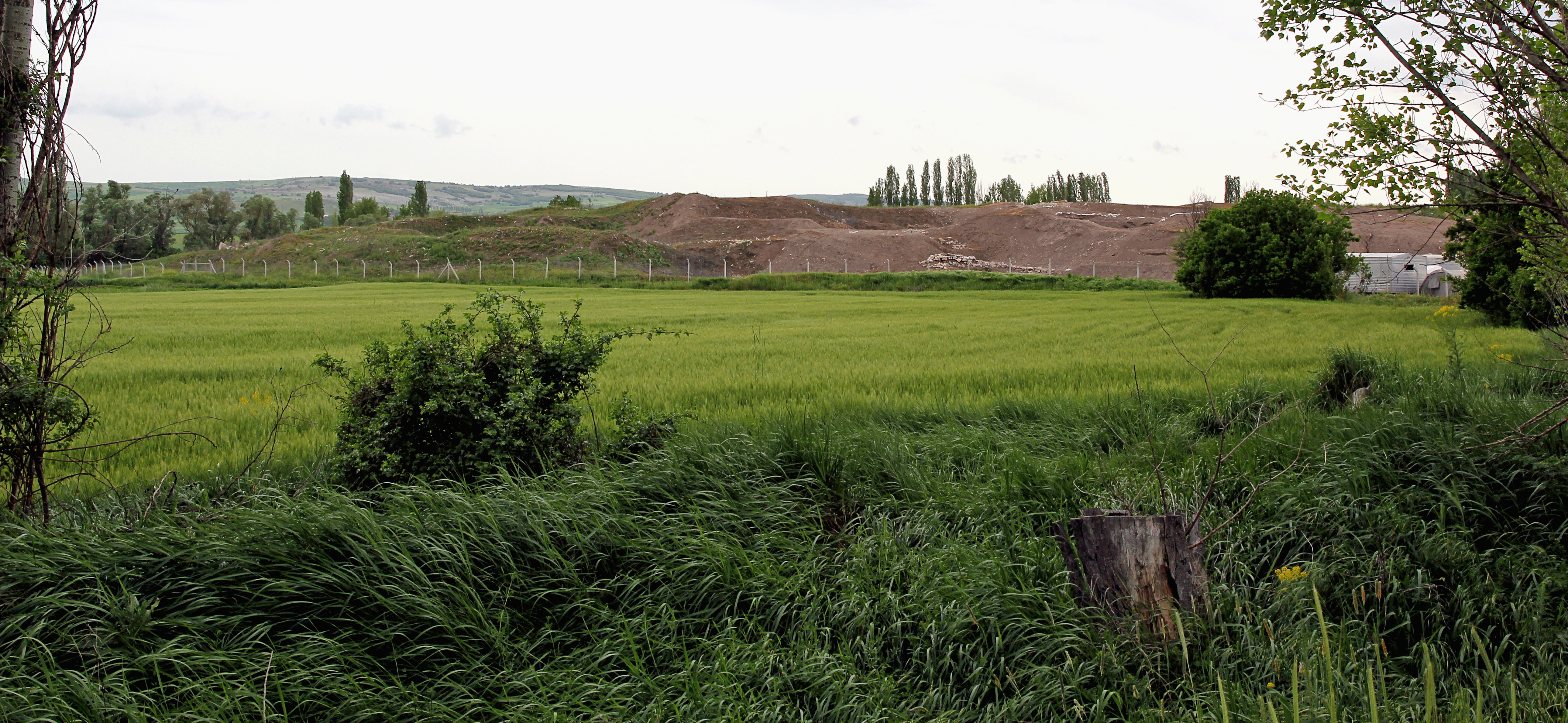 Eskiyapar, antiker Siedlungshügel in der nordtürkischen Provinz Çorum, Blick von Norden